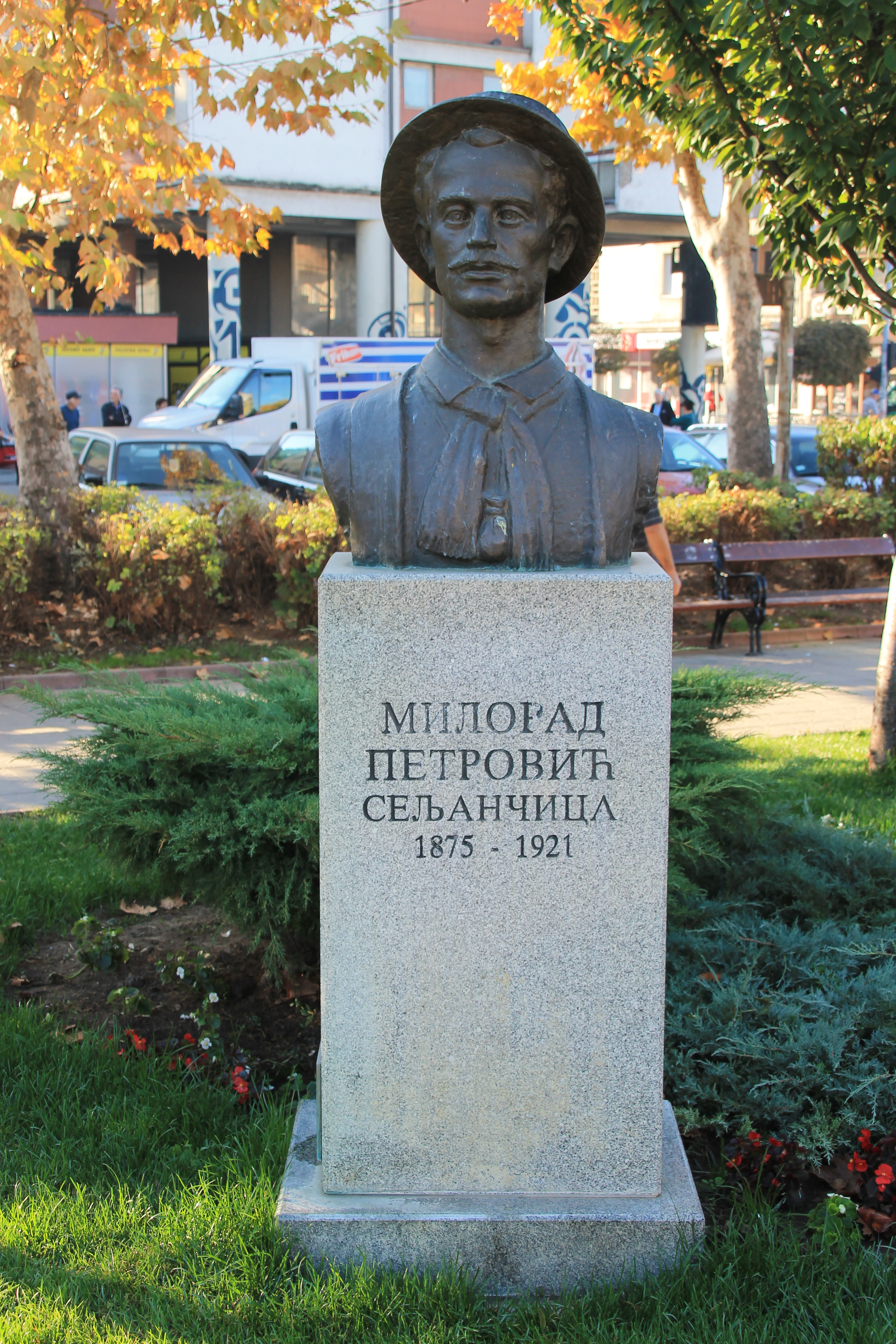 Monuments and memorials in Mladenovac